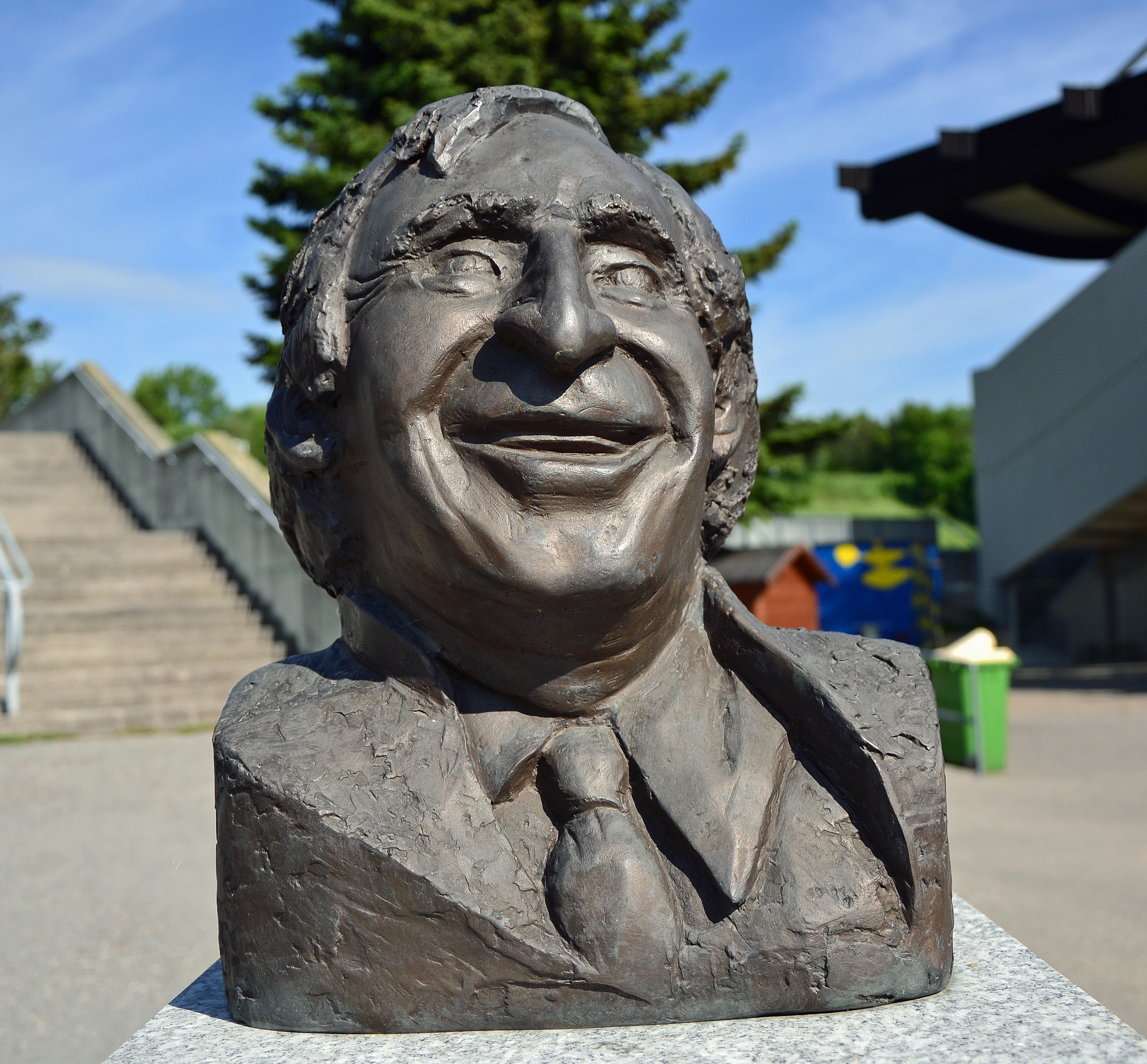 Karl Decker - Denkmal